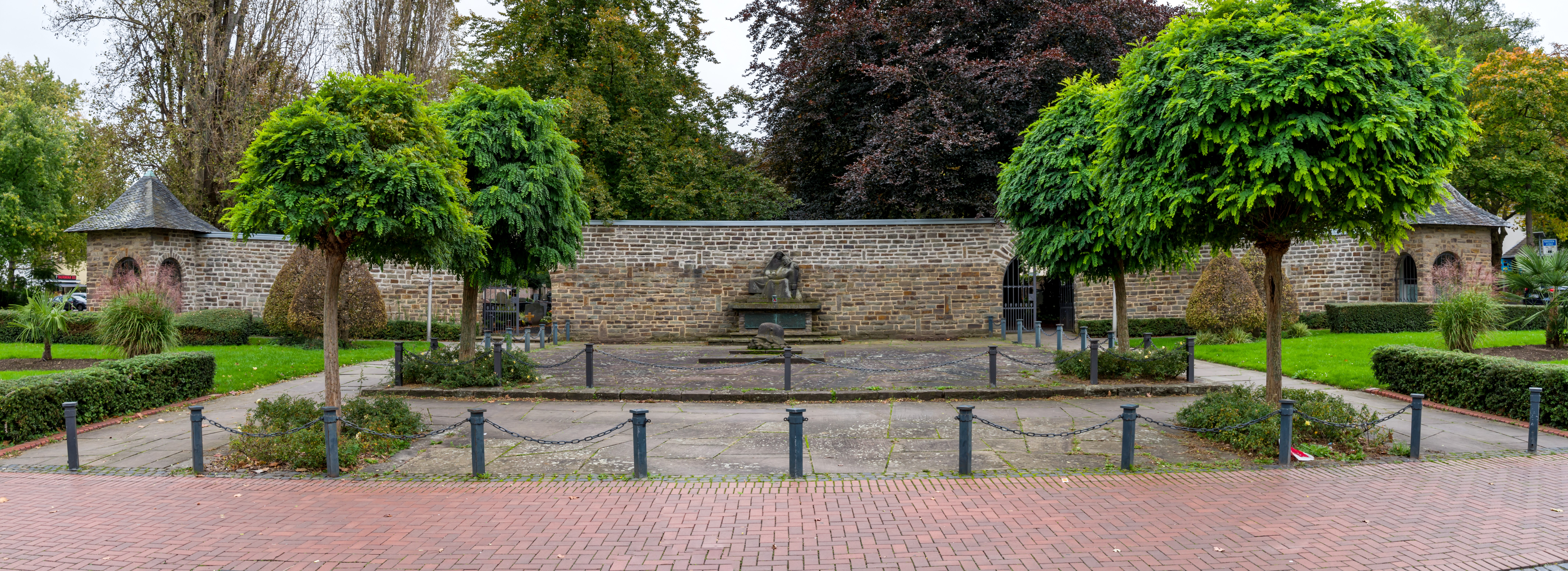 Kriegerdenkmal, Rochusplatz, Bonn-Duisdorf